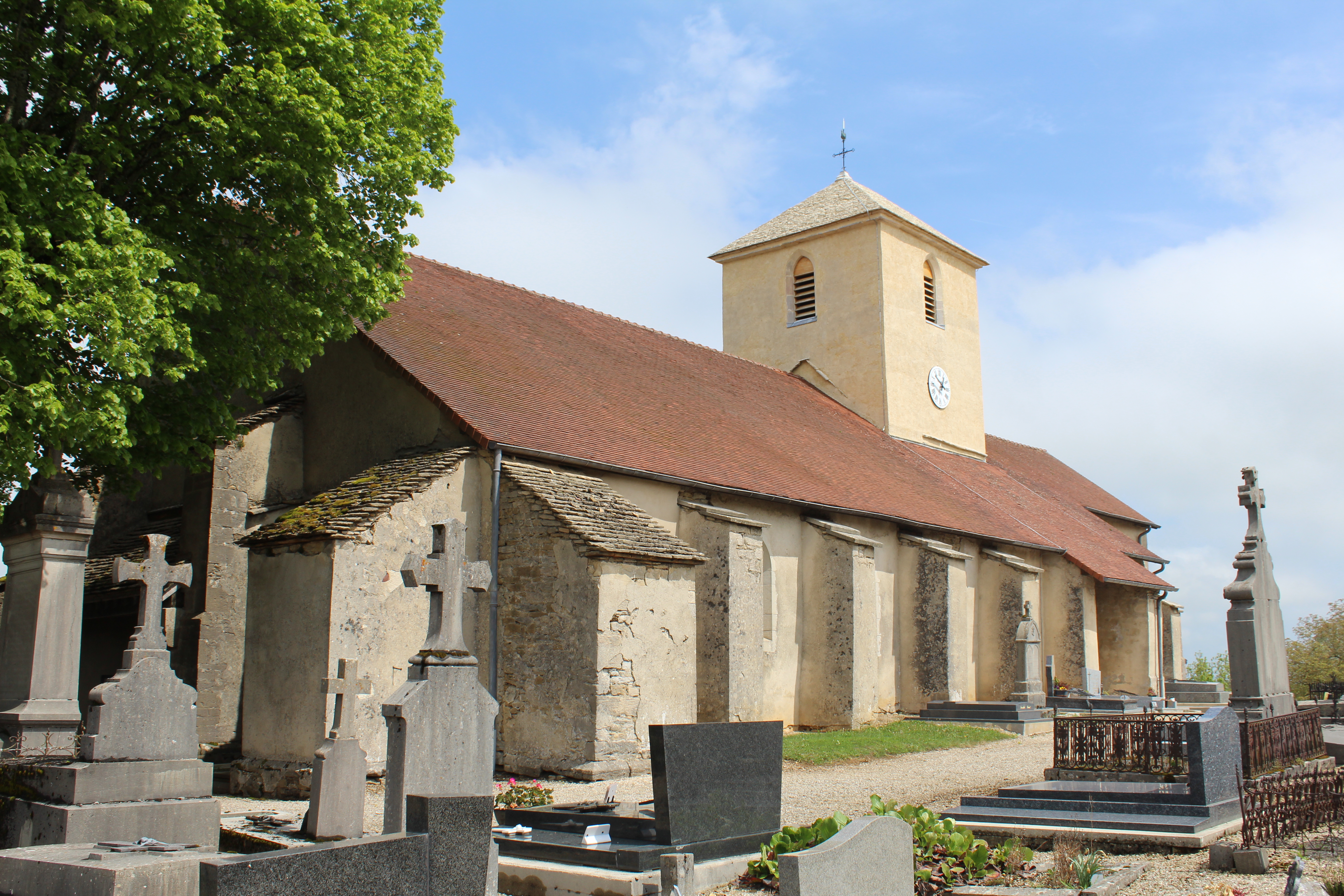 Église Saint-Maur de Saint-Maur, Jura.